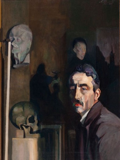 Zelfportret van Nicolaas Pieneman (1880-1938)